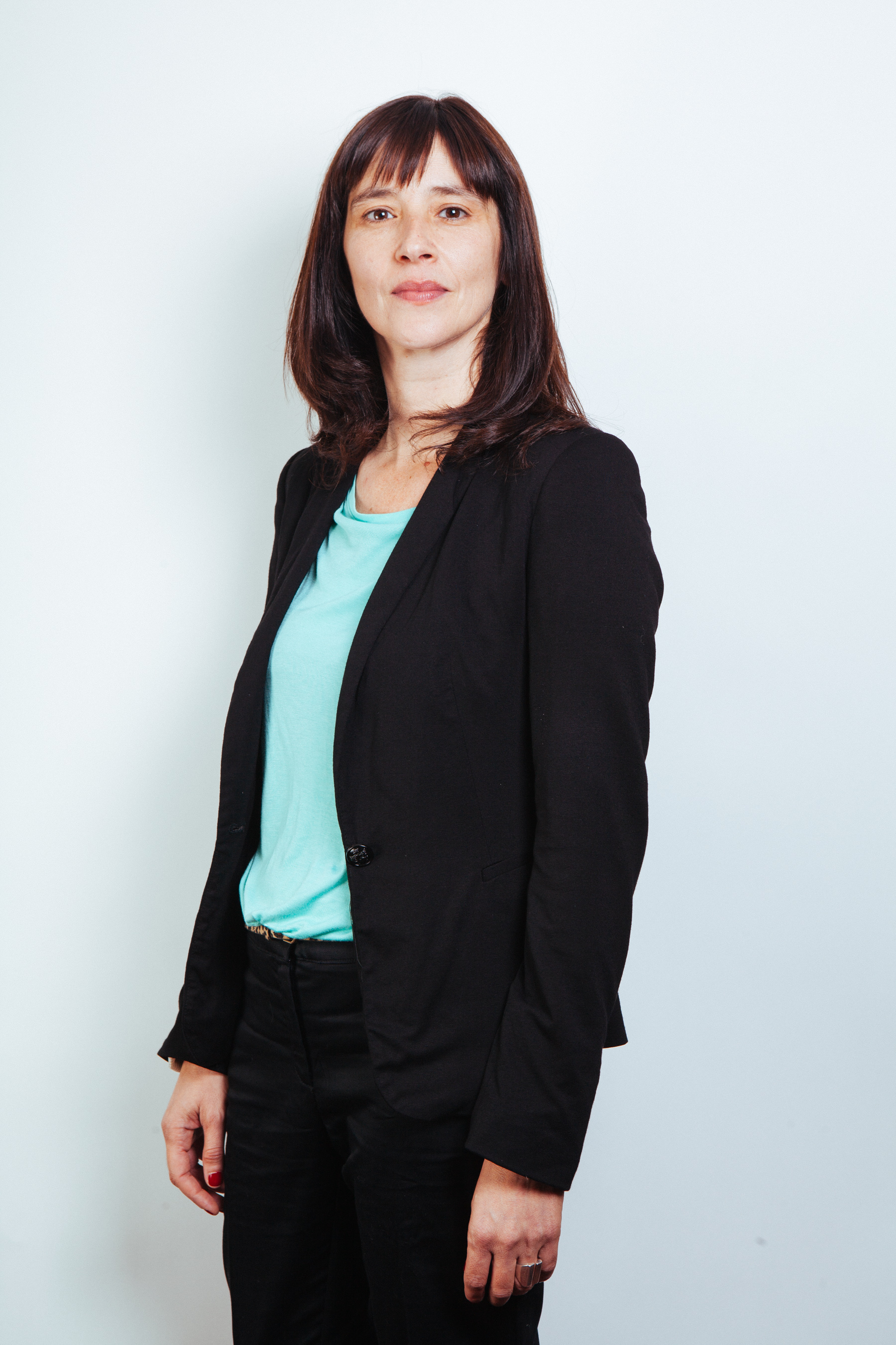 Ministro de Estado del segundo gobierno de Michelle Bachelet (2014-2018)